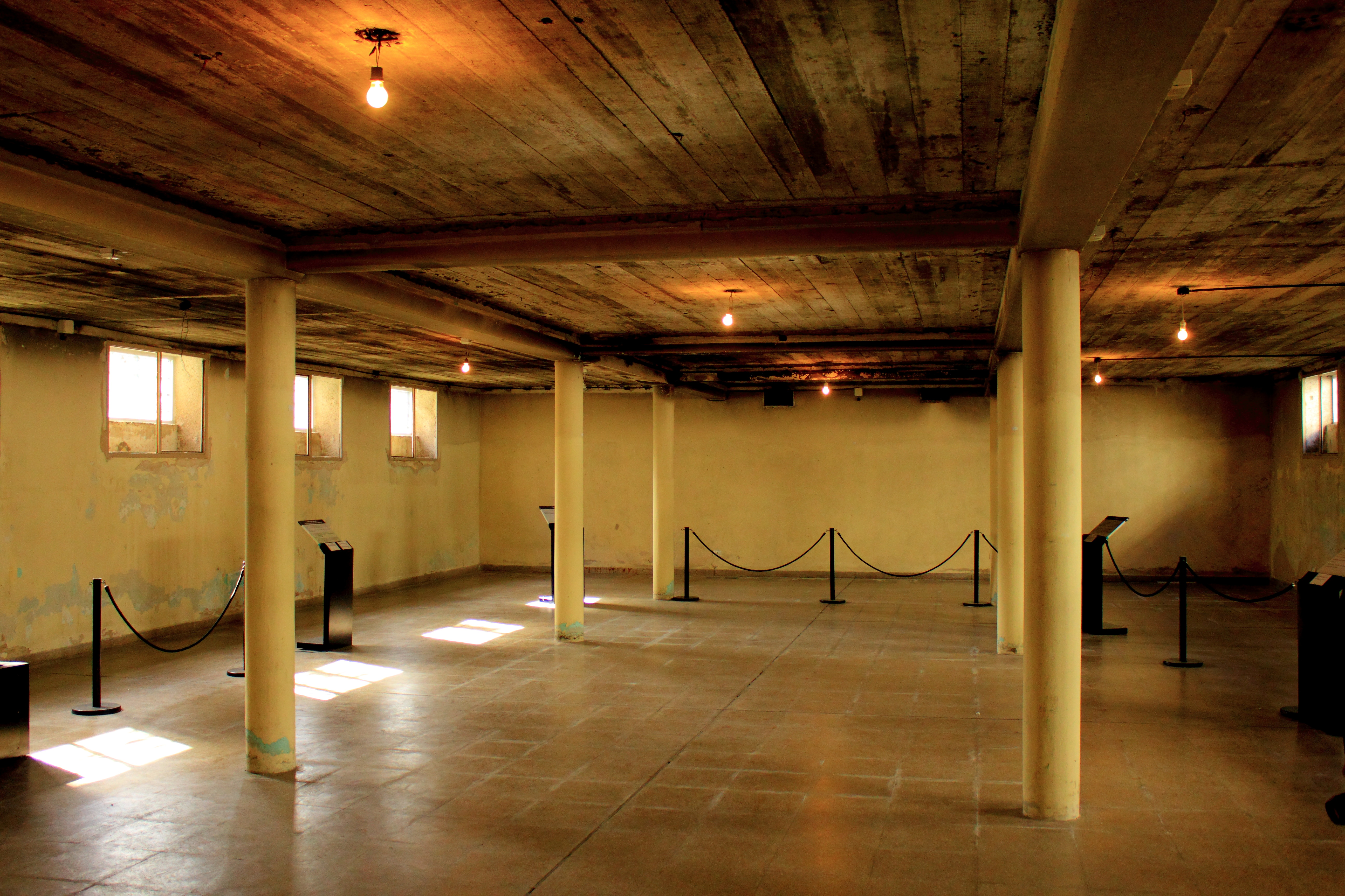 Sótano del "Casino de Oficiales" de la Escuela de Mecánica de la Armada. Allí funcionaba un Centro Clandestino de Detención de Personas